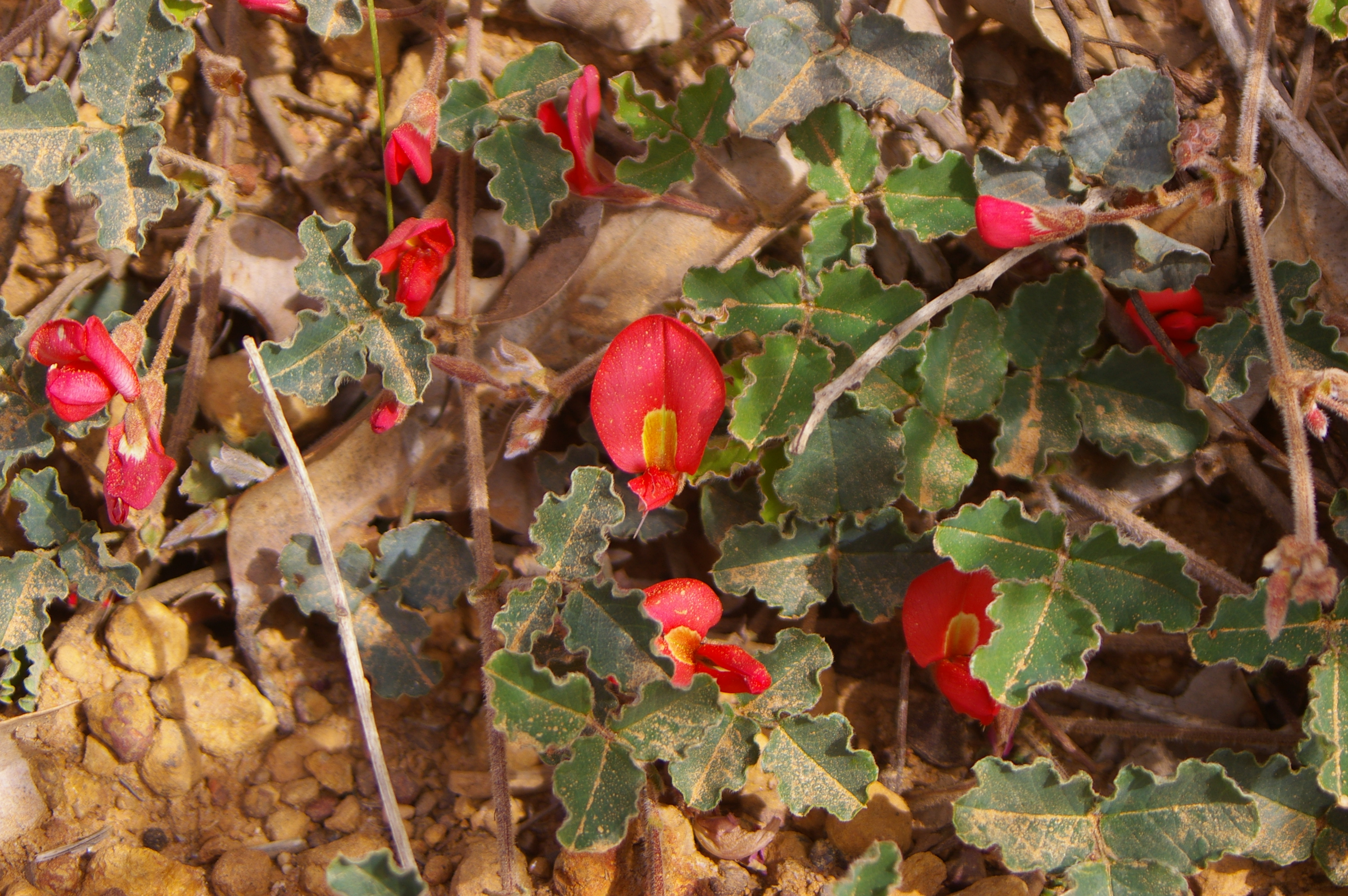 Kennedia prostrata